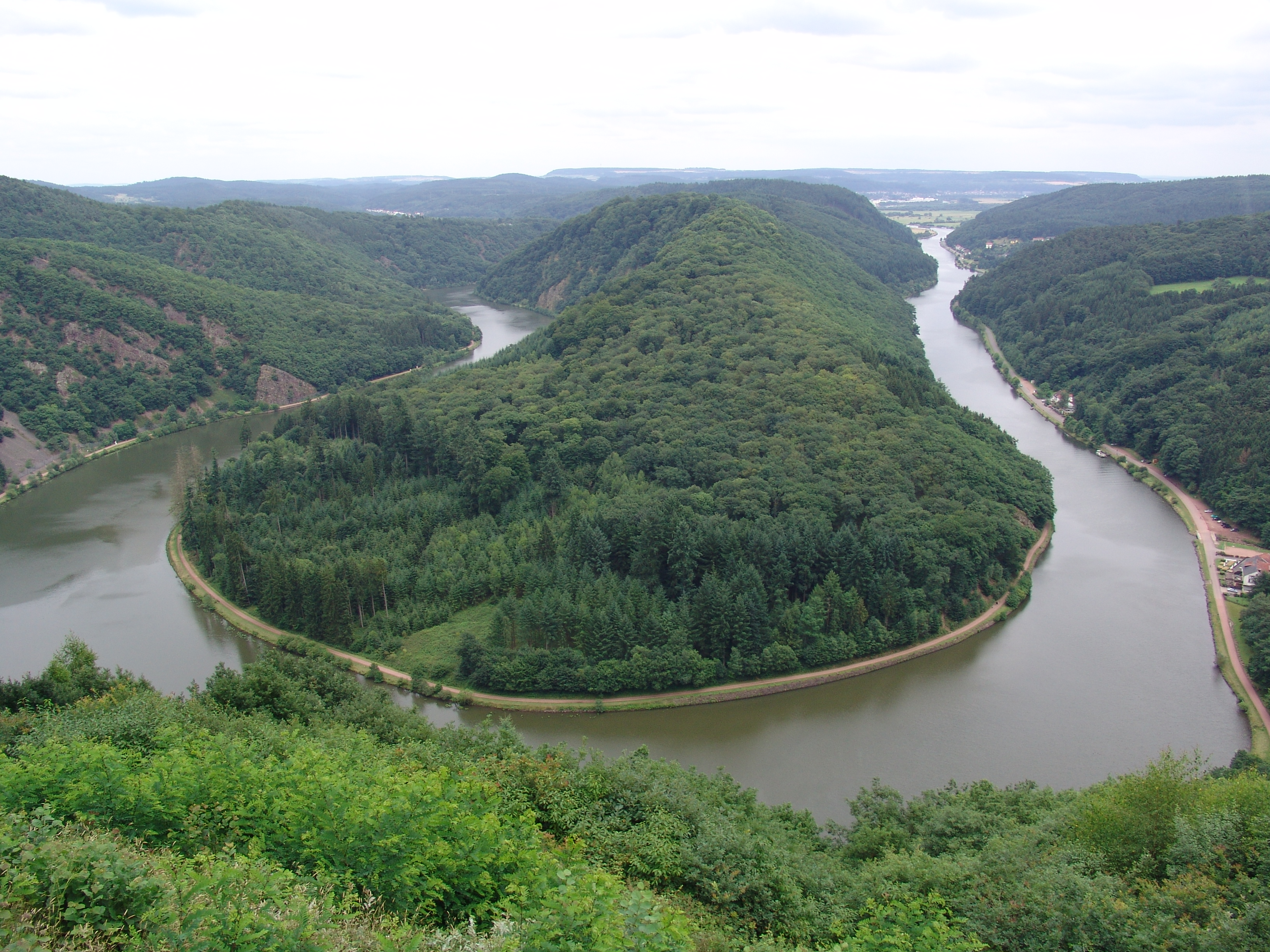 Blick auf die Saarschleife das Aushängeschild des Saarlandes